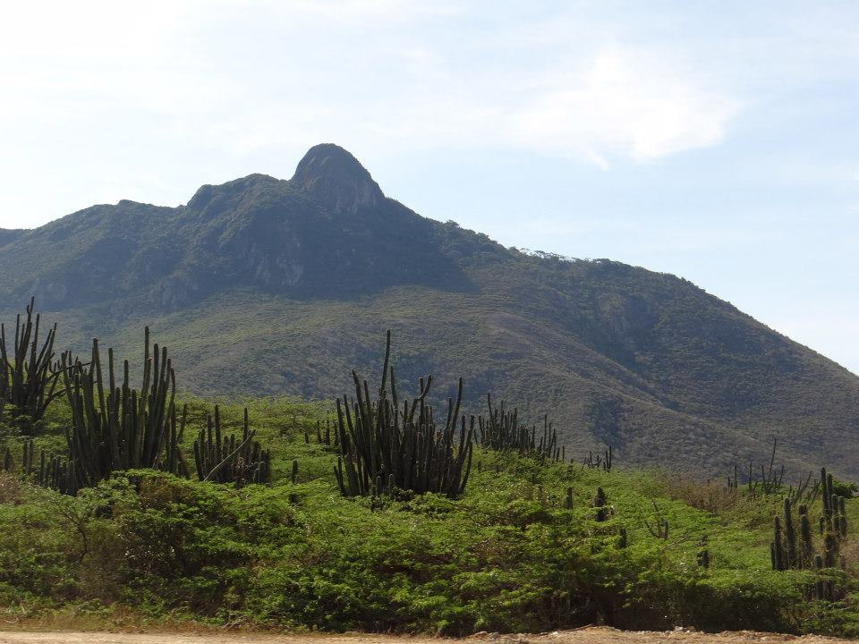 Estado Falcón